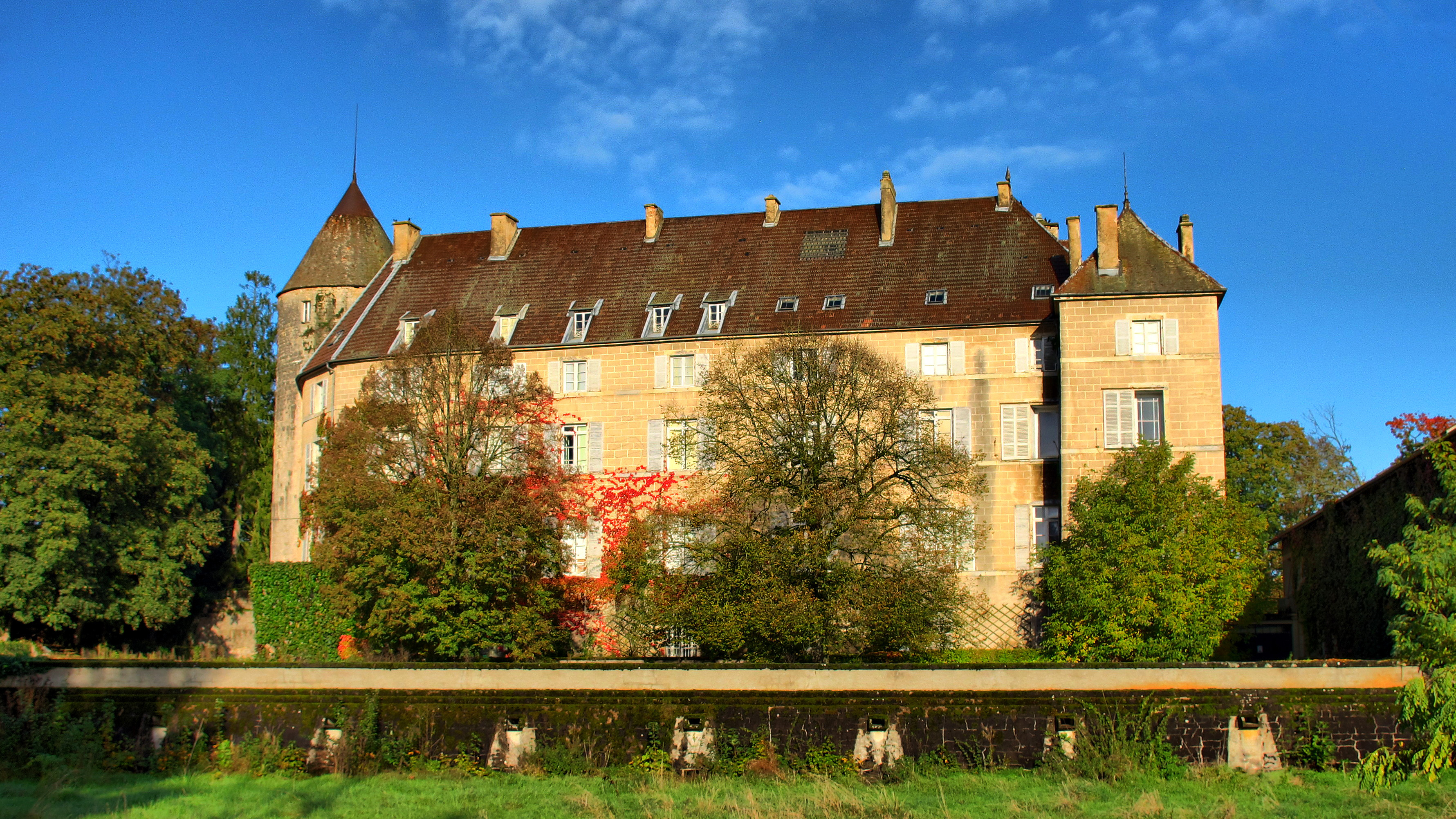 Inscrit aux monuments historiques sous le numéro PA00102171